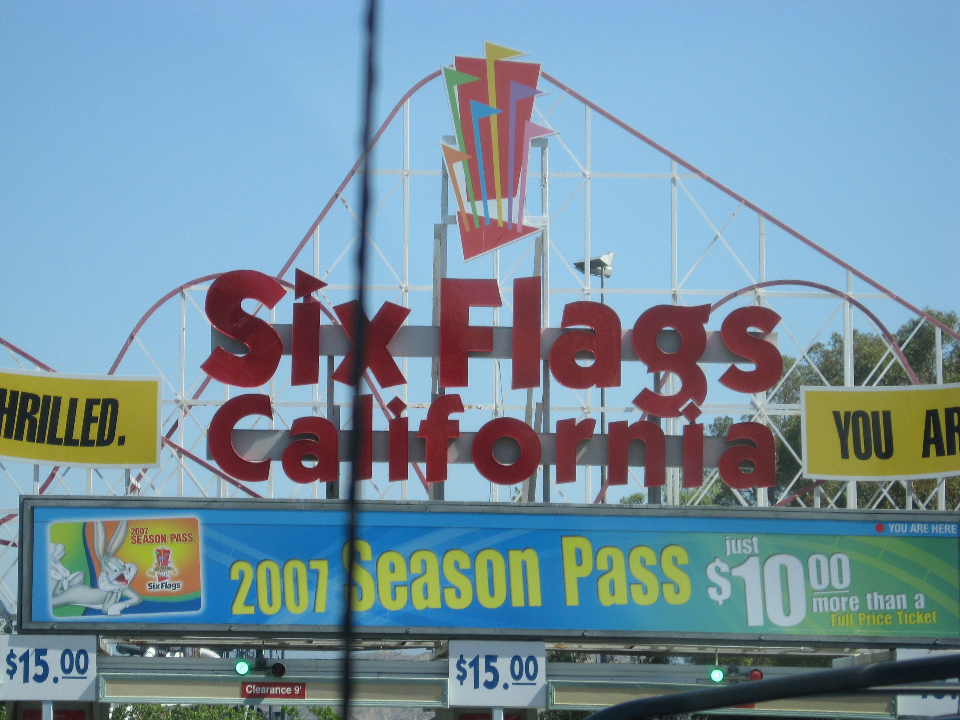 Six Flag Magic Mountain California